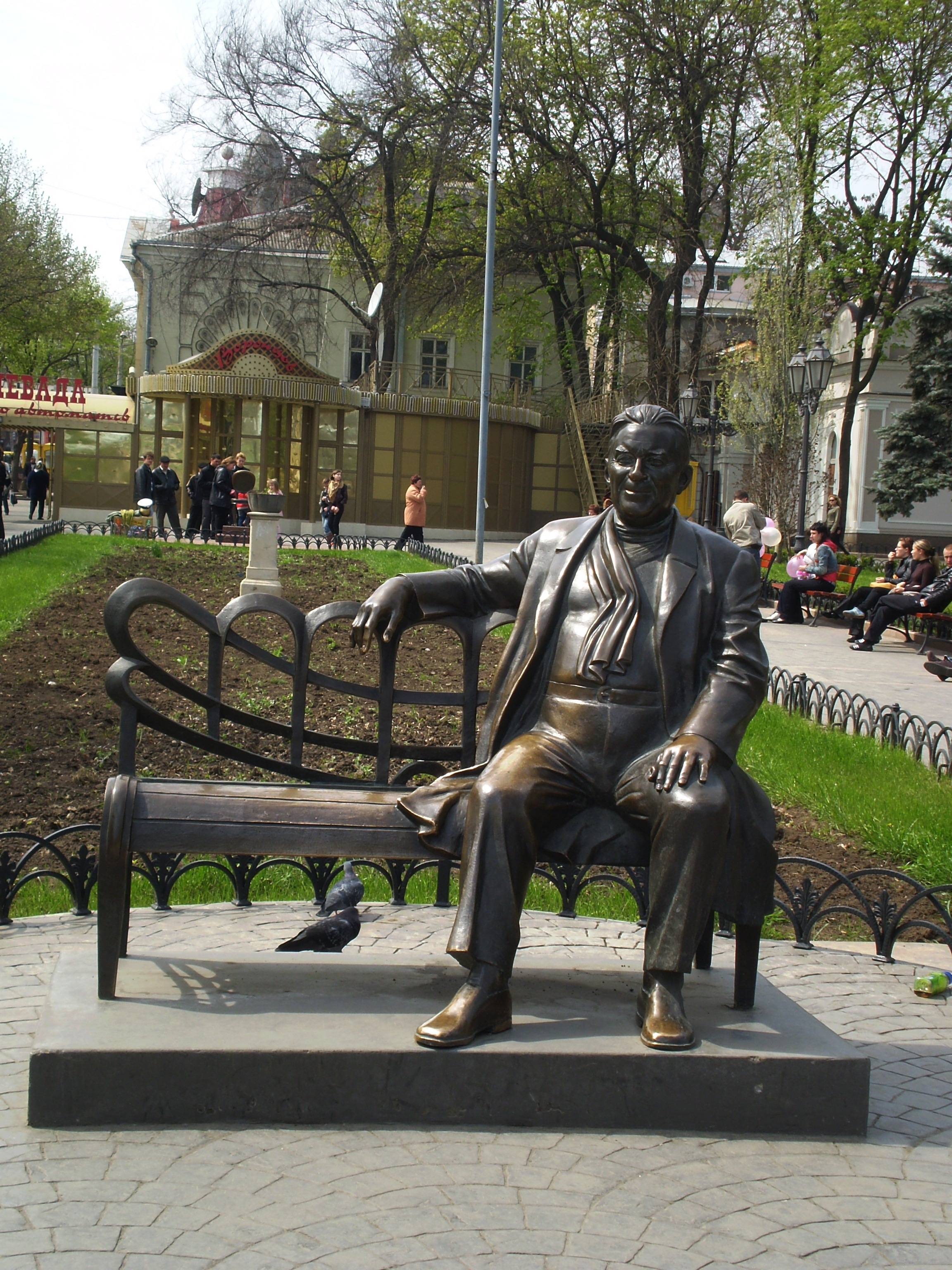 Utiosov's monument in Odessa